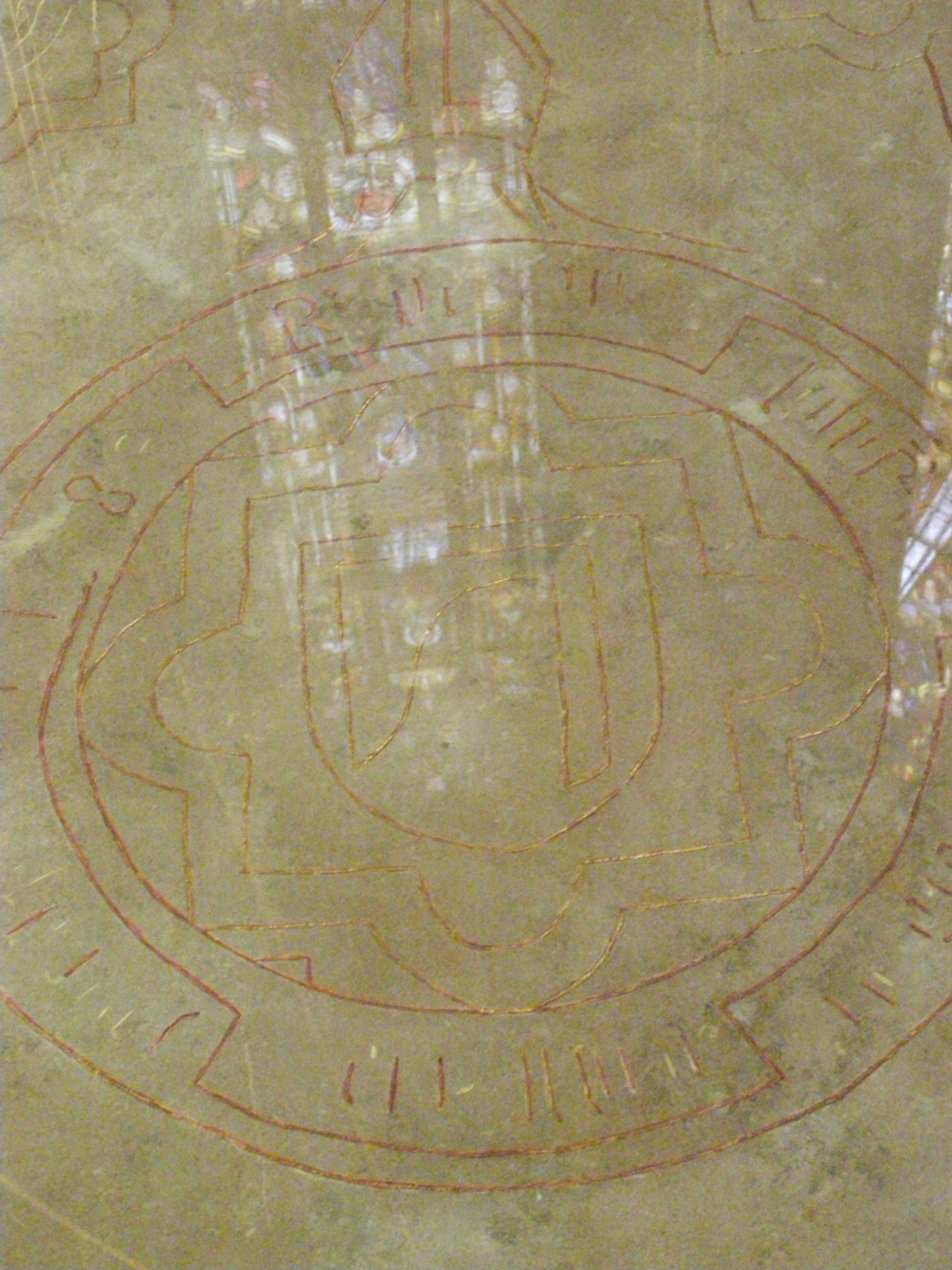 Katedra włocławska - epitafium Zbyluta Pałuki z Wąsosza